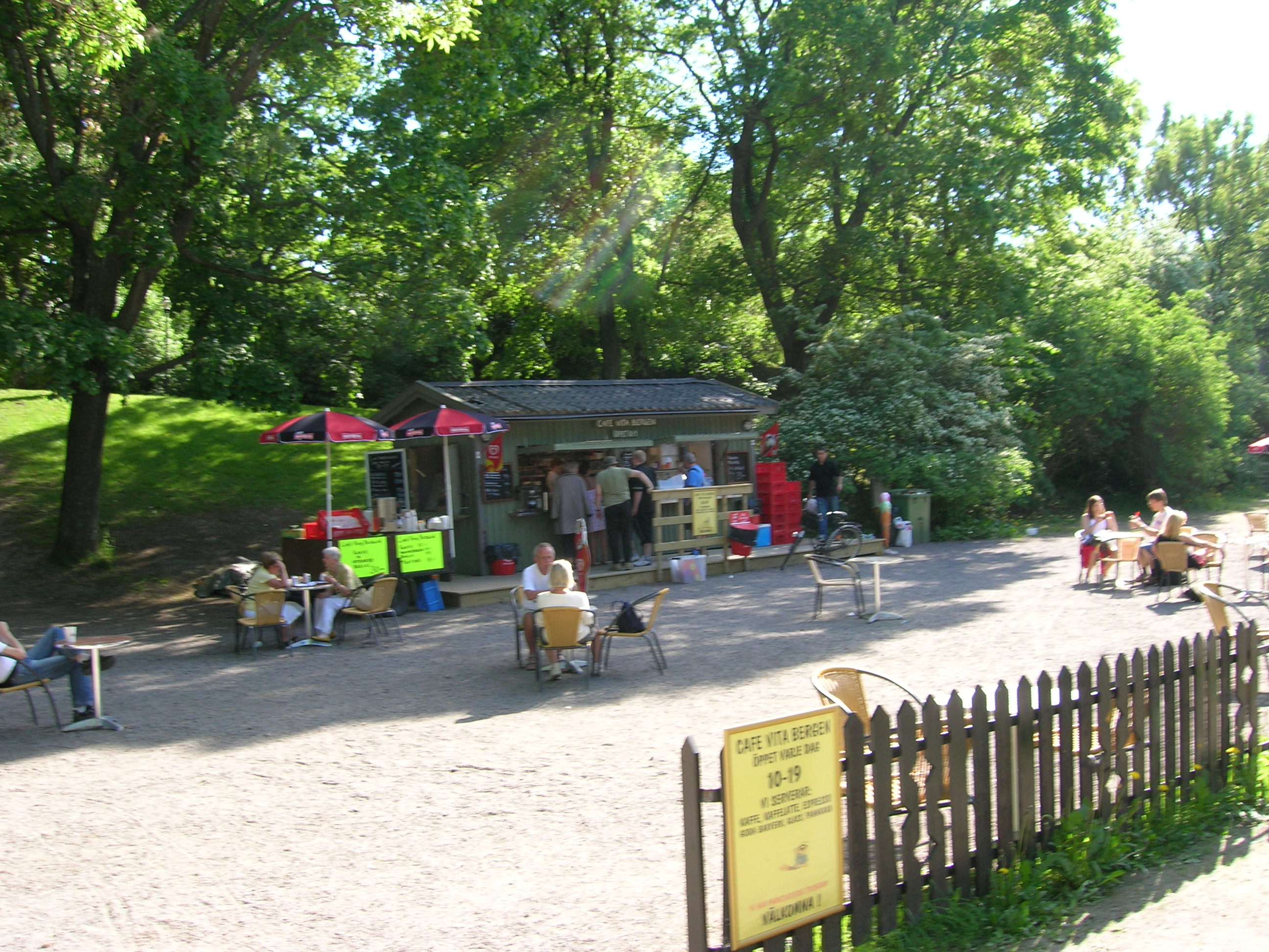 Café Vita bergen, Södermalm, Stockholm, 11 juni 2006 Fotograf: Niklas Nordblad